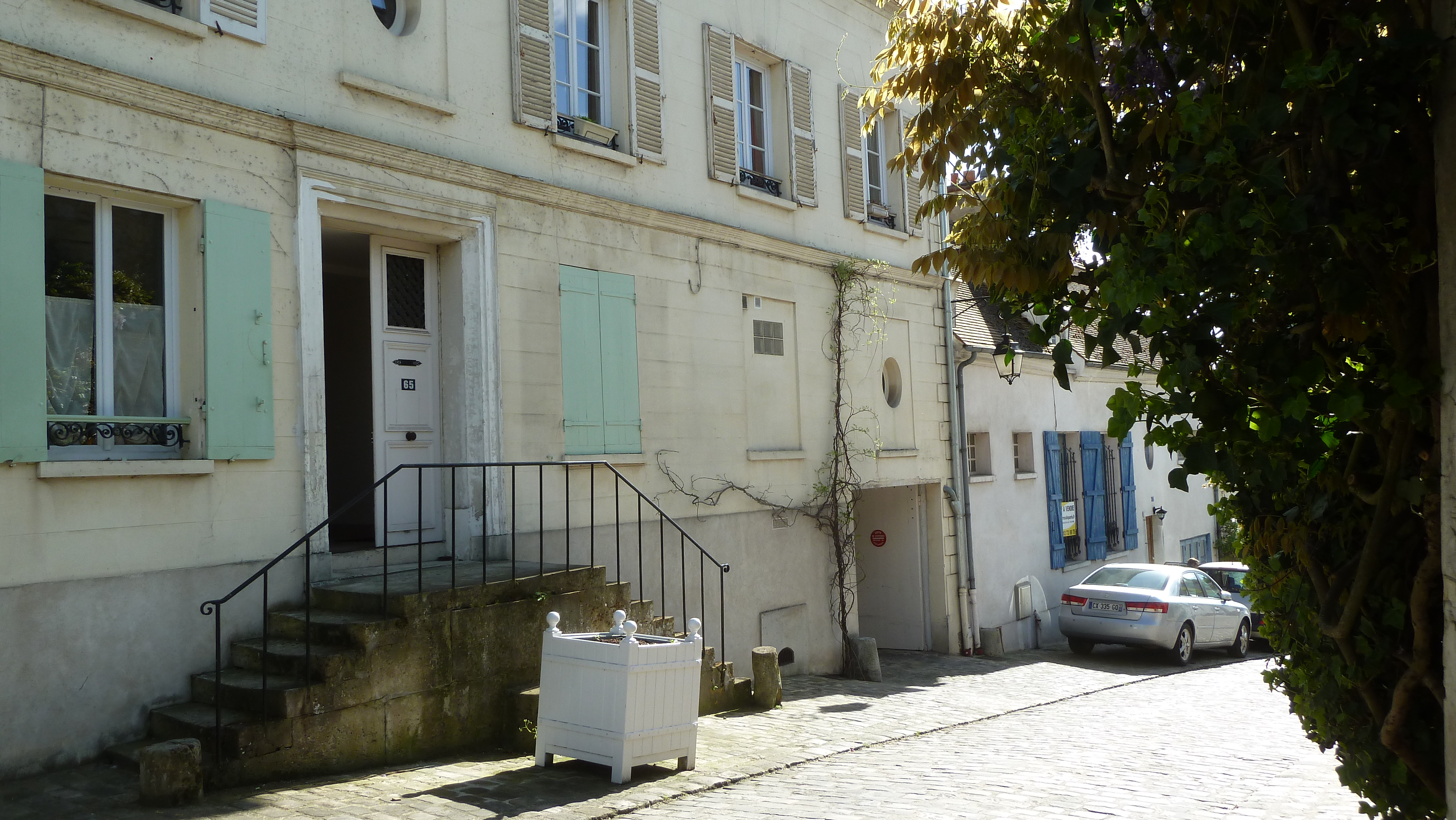 Rue ancienne de Neauphle-le-Château encore pavée